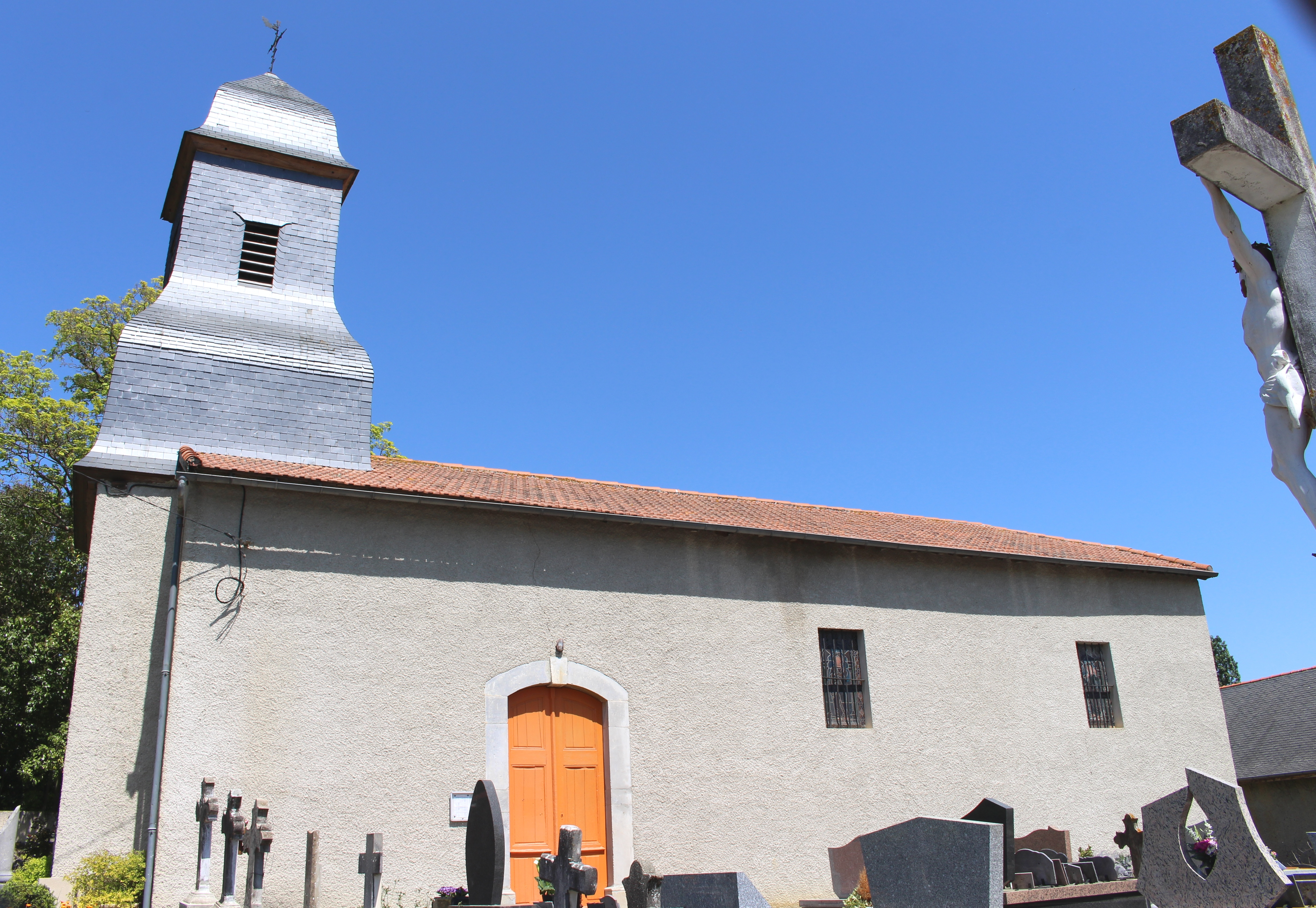 Église Saint-Laurent de Collongues (Hautes-Pyrénées)